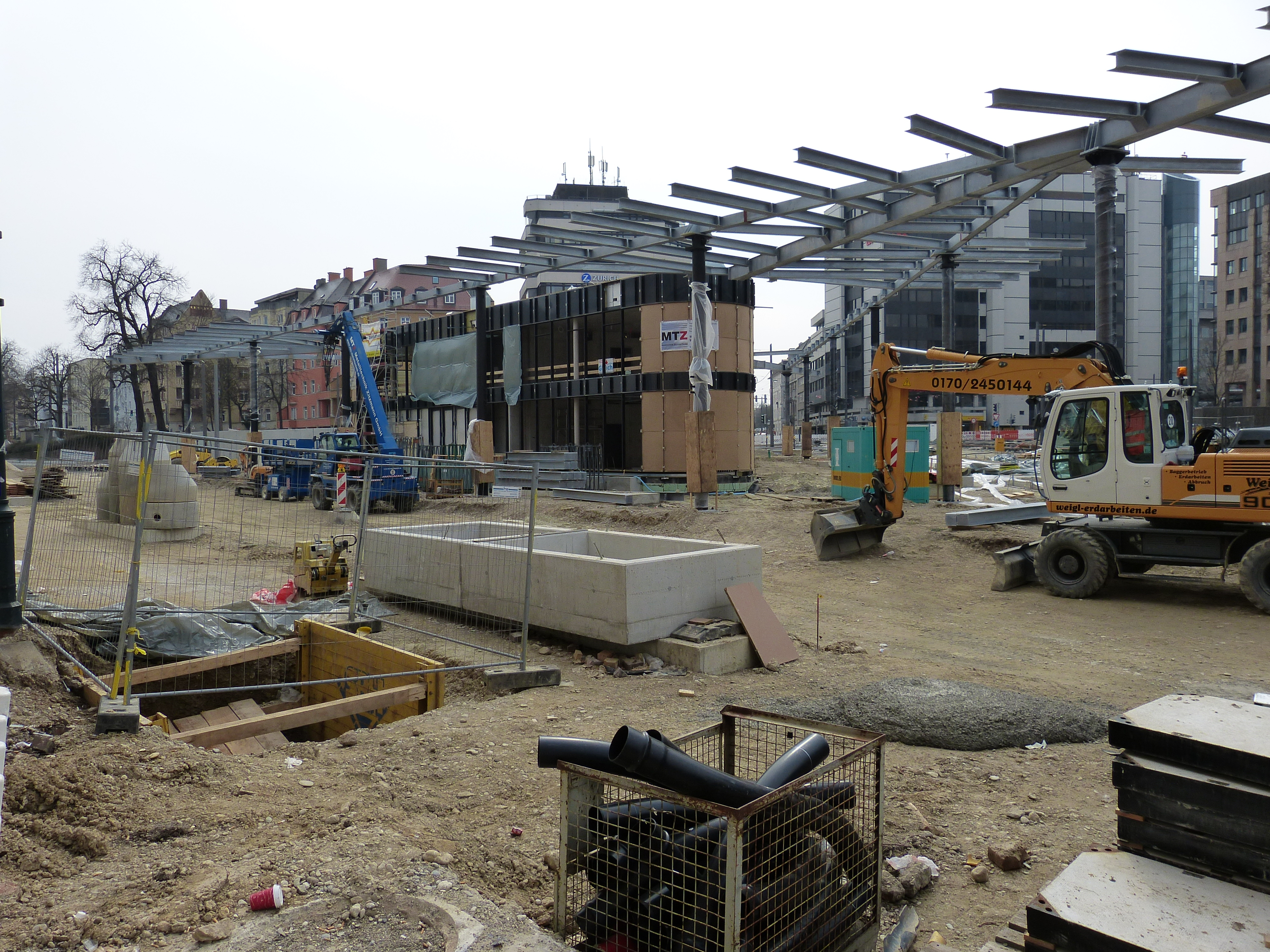 Baustelle des Umbaus des Königsplatzes in Augsburg im Rahmen des "Projekts Augsburg City", im März 2013